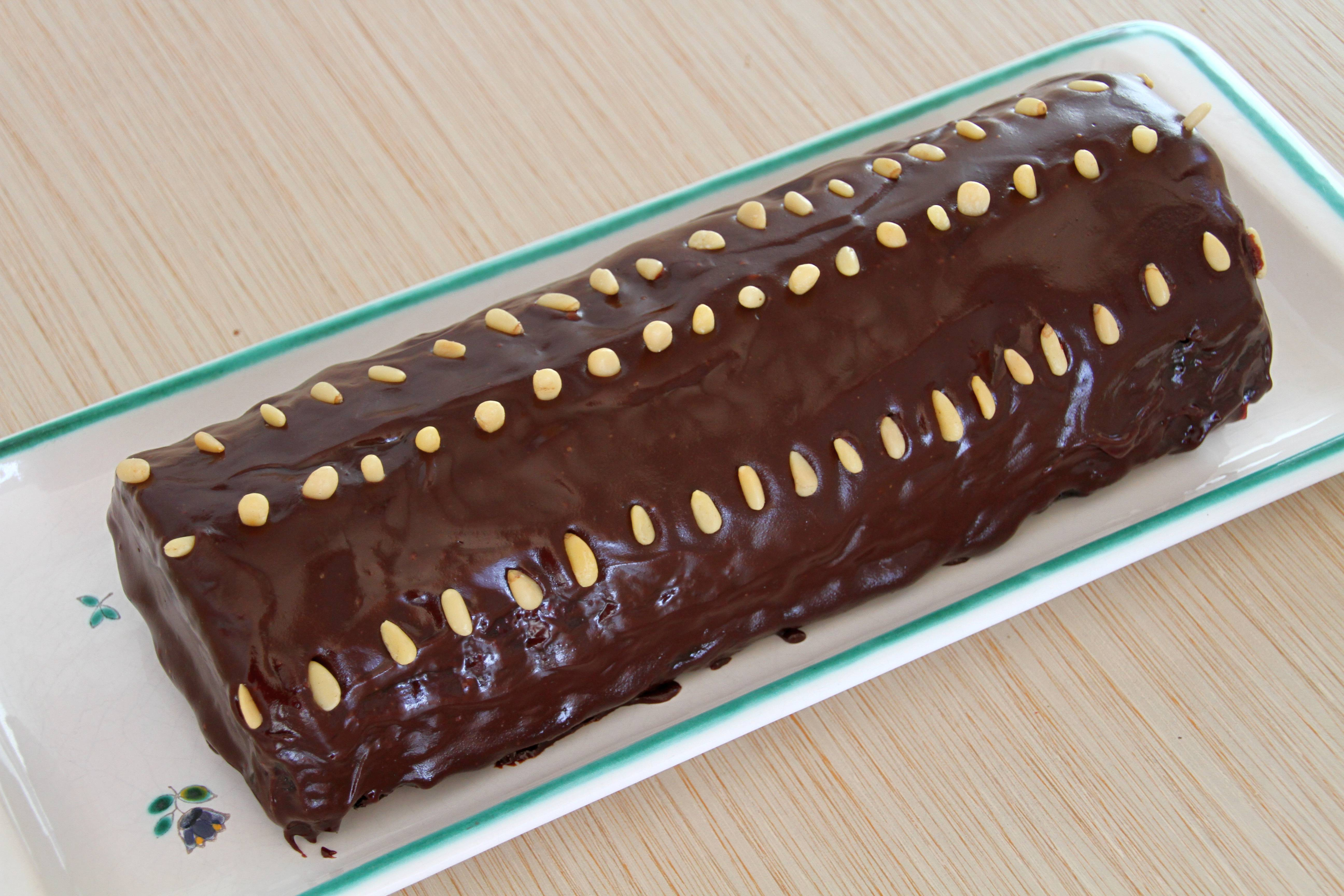 Rehrücken, gespickt mit Pignoli